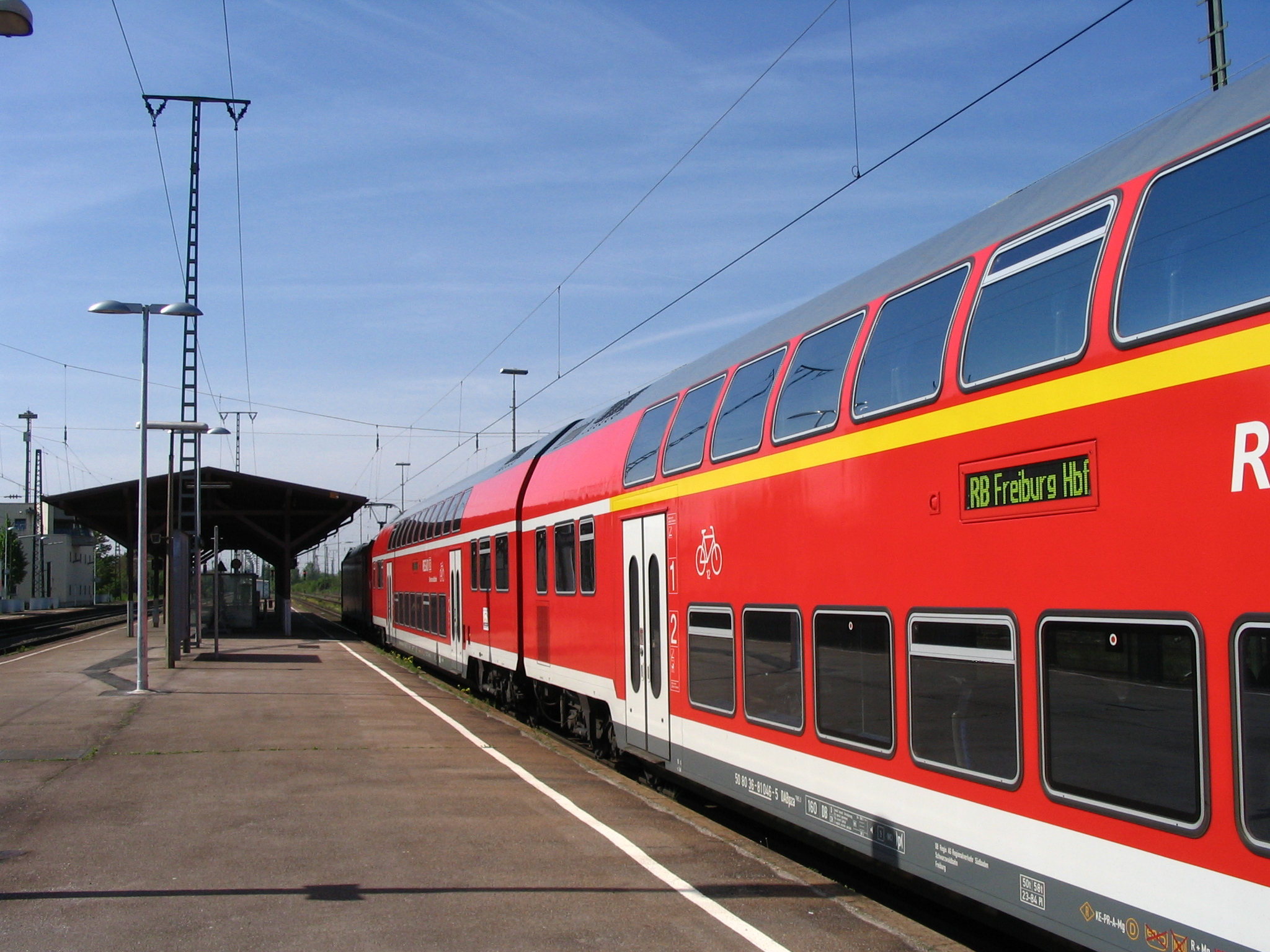 Doppelstockwagen von DB auf Bahnhof Müllheim